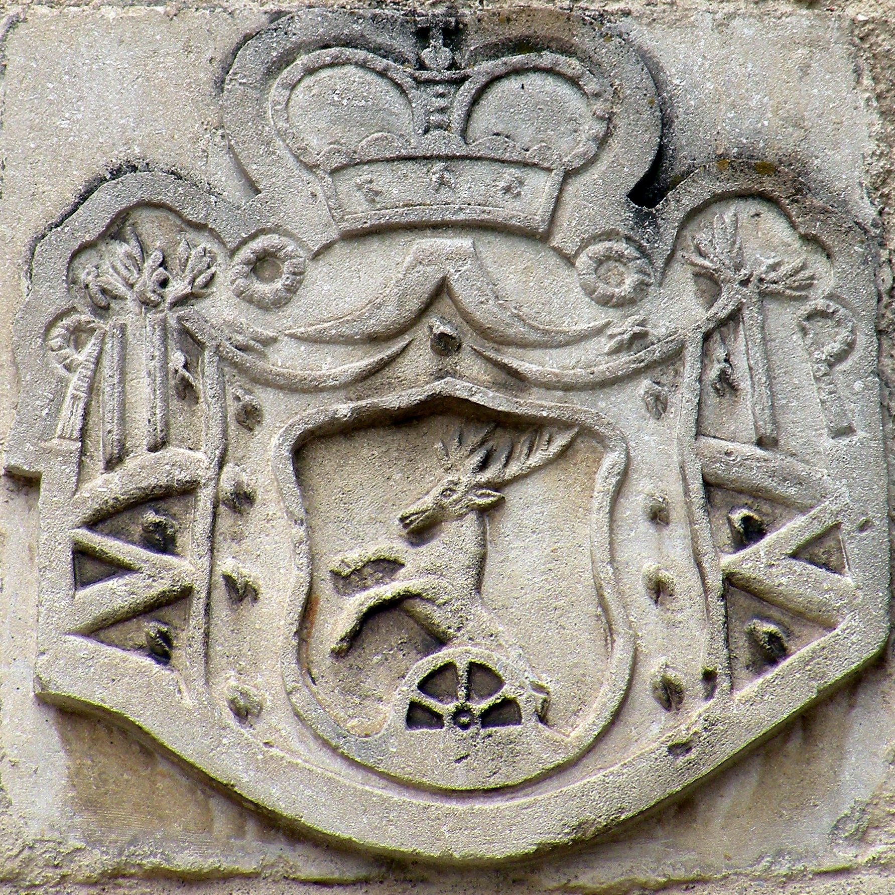 Wappen der Burgherrenfamilie Pálffy, der ab der zweiten Hälfte des 17. Jahrhunderts bis 1947 das Schloss gehörte.